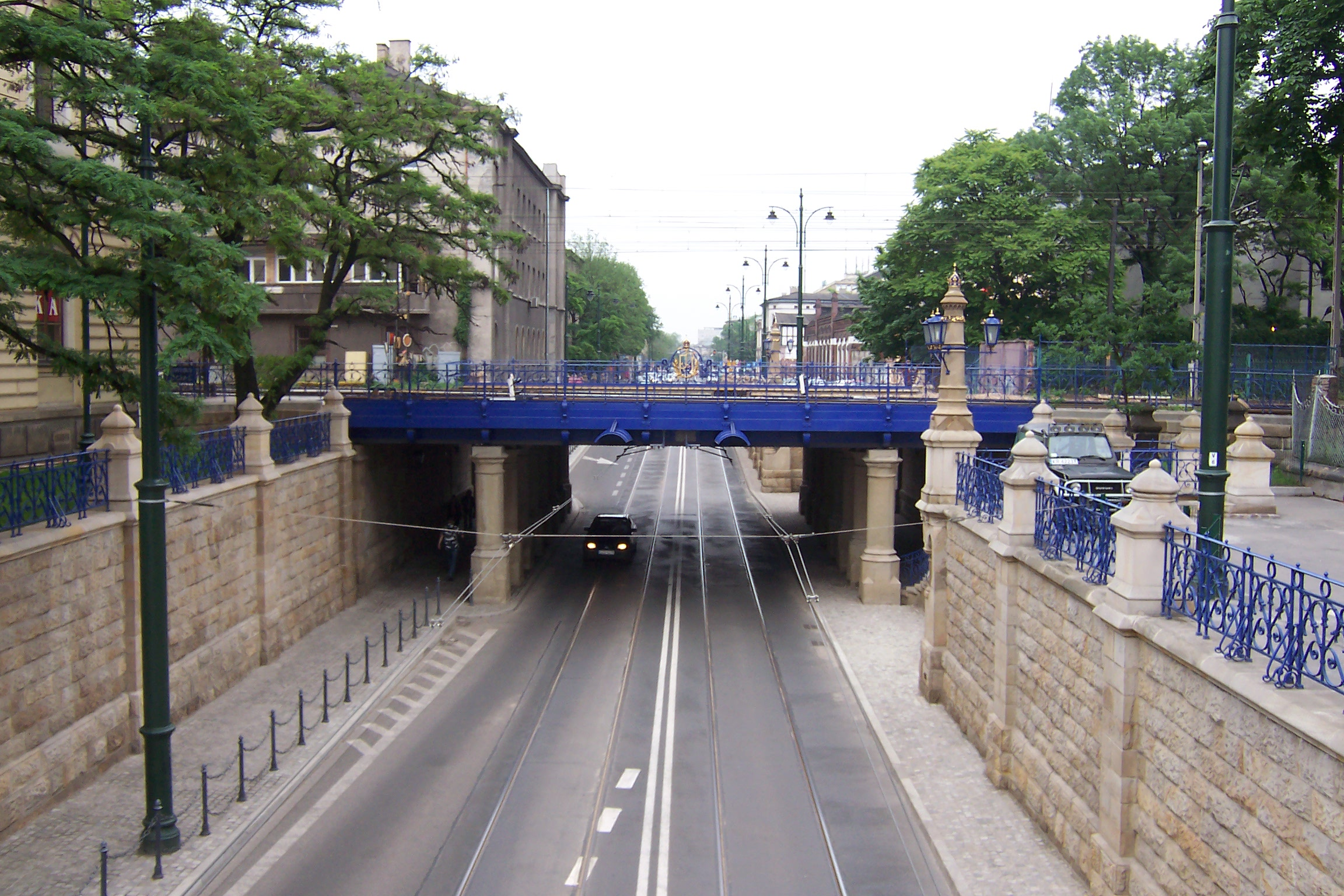 Lubicz Street, Cracow, Poland / ulica Lubicz, Kraków, Polska